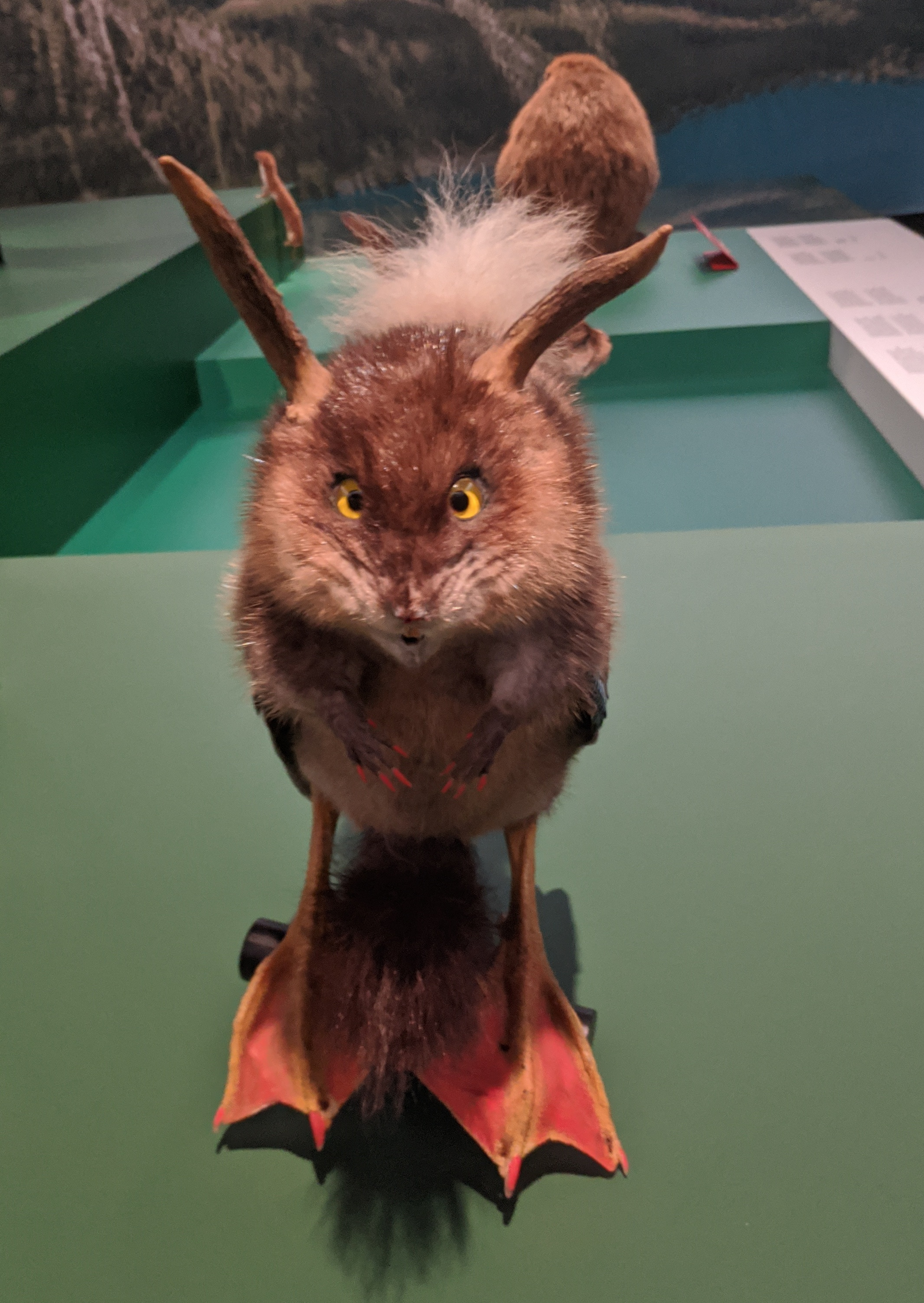 Woipertinger vom Haus der Bayrischen Geschichte (Regensburg)